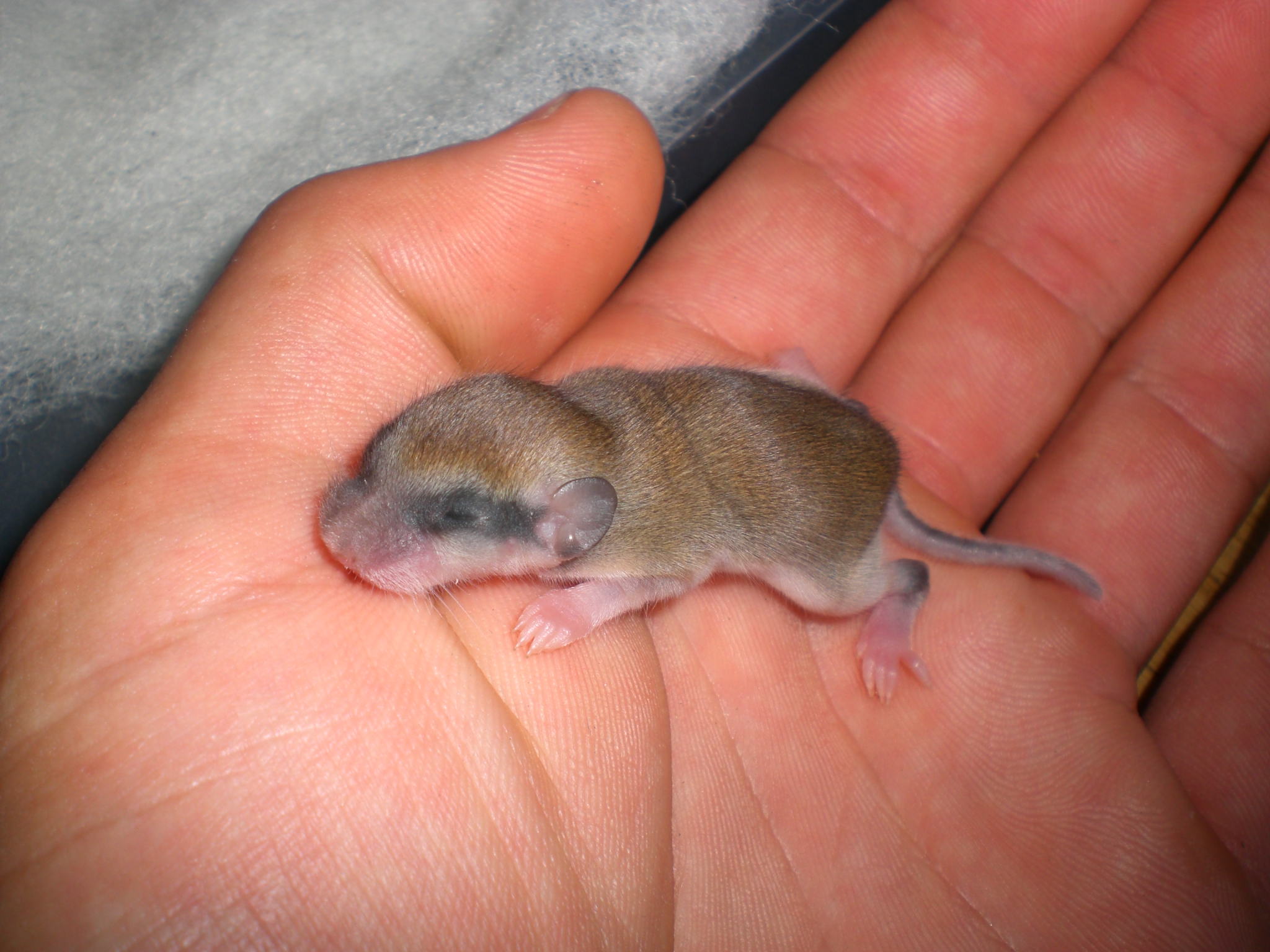 2 hetes erdei pele